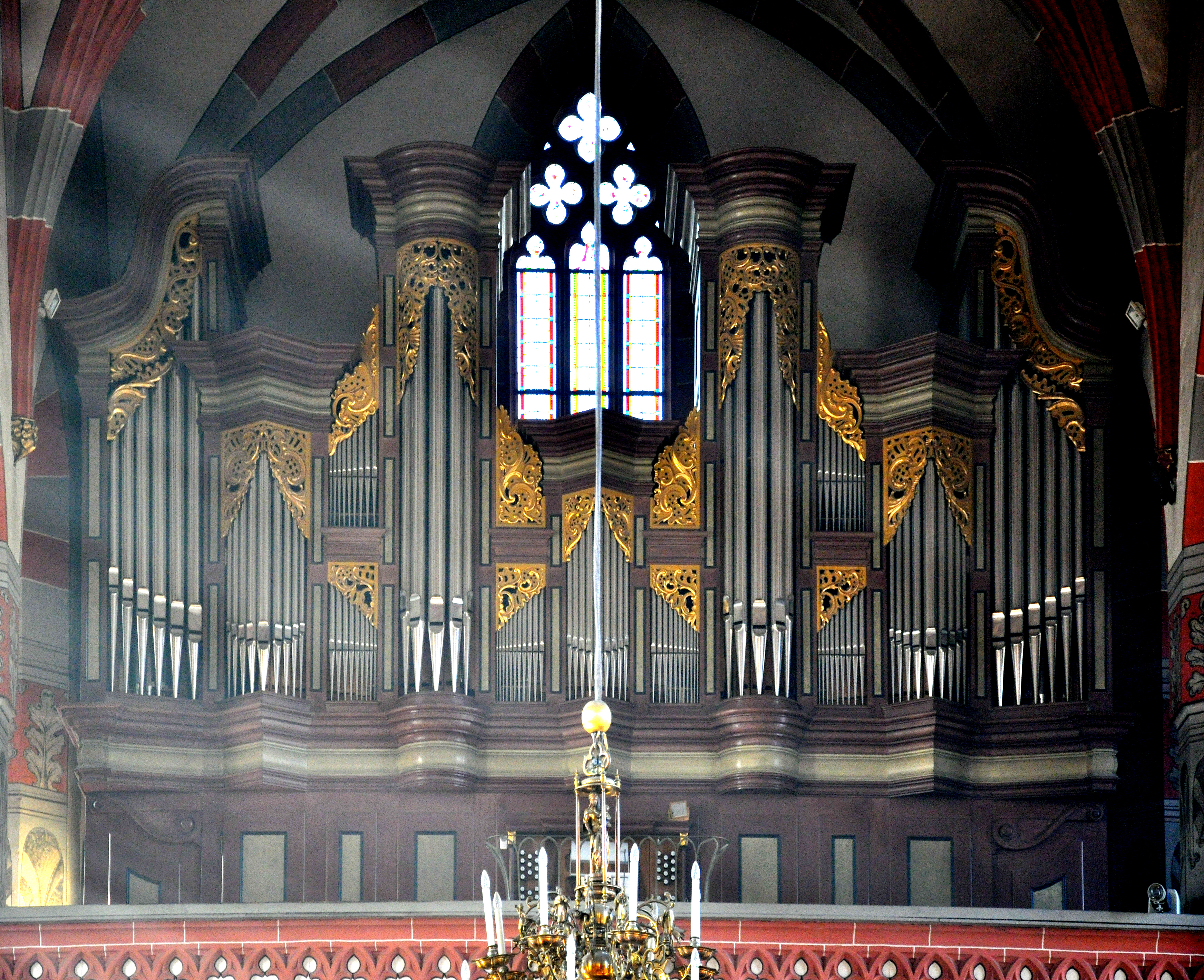 Ochsenfurt, Katholische Stadtpfarrkirche St. Andreas, Winterhalter-Orgel von 1997 in historischem Gehäuse der Seuffert-Orgel von 1754